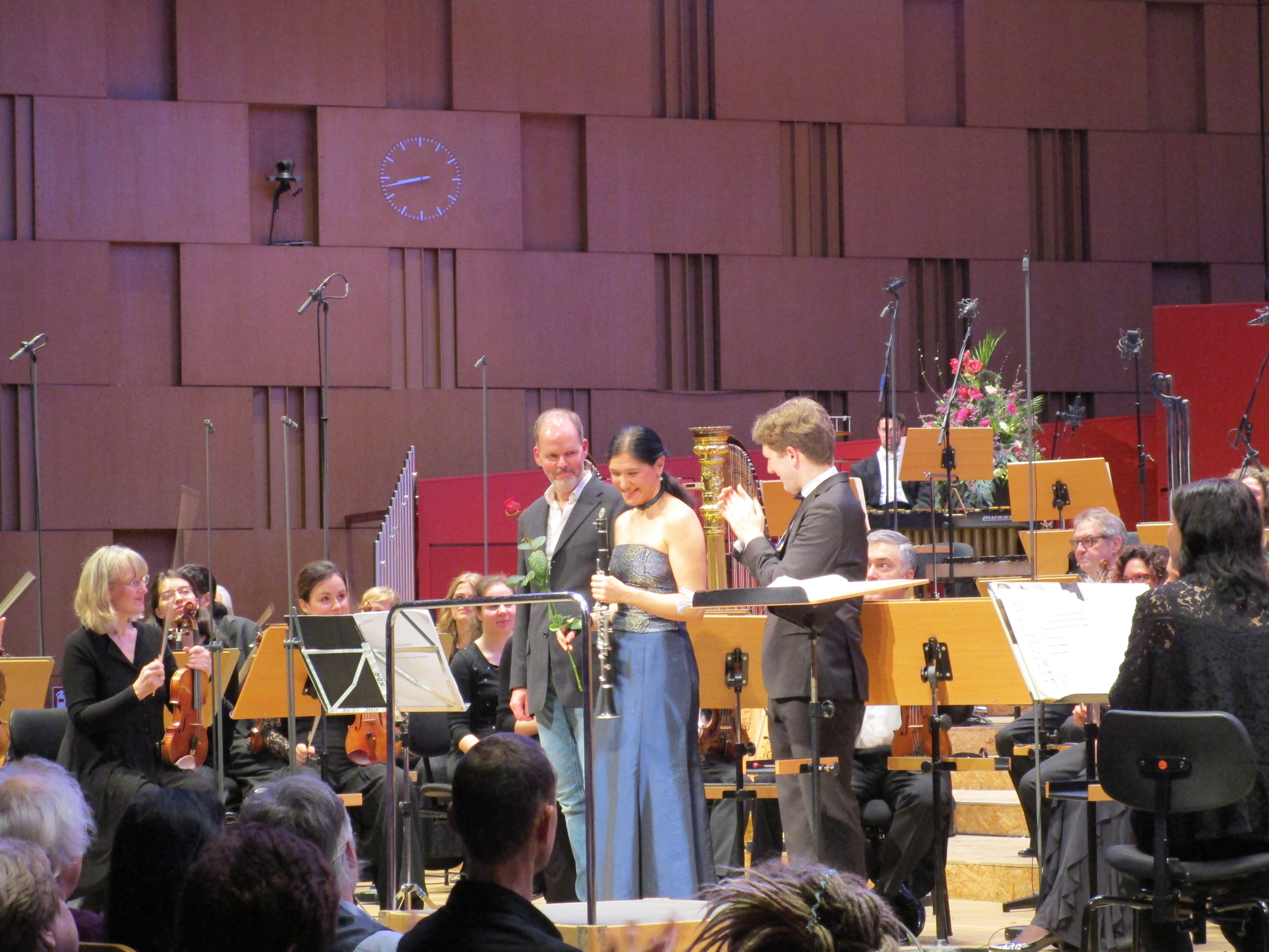 Das Konzert für Klarinette und Orchester (2018) von Thorsten Encke ist ein Auftragswerk des Norddeutschen Rundfunks. Die Uraufführung gestalteten die Klarinettistin Sharon Kam und die NDR Radiophilharmonie unter dem Dirigat von Joshua Weilerstein am 10. Januar 2019 im Großen Sendesaal des NDR-Funkhauses in Hannover. Am folgenden Tag, dem 11. Januar 2019, führten sie das Werk erneut auf.